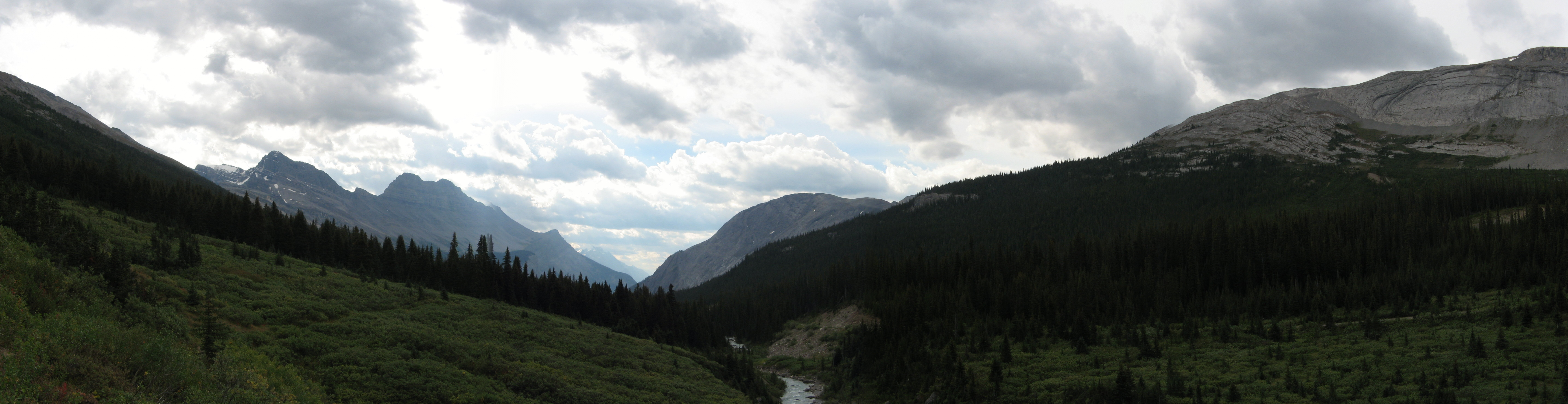 Nigelpass1